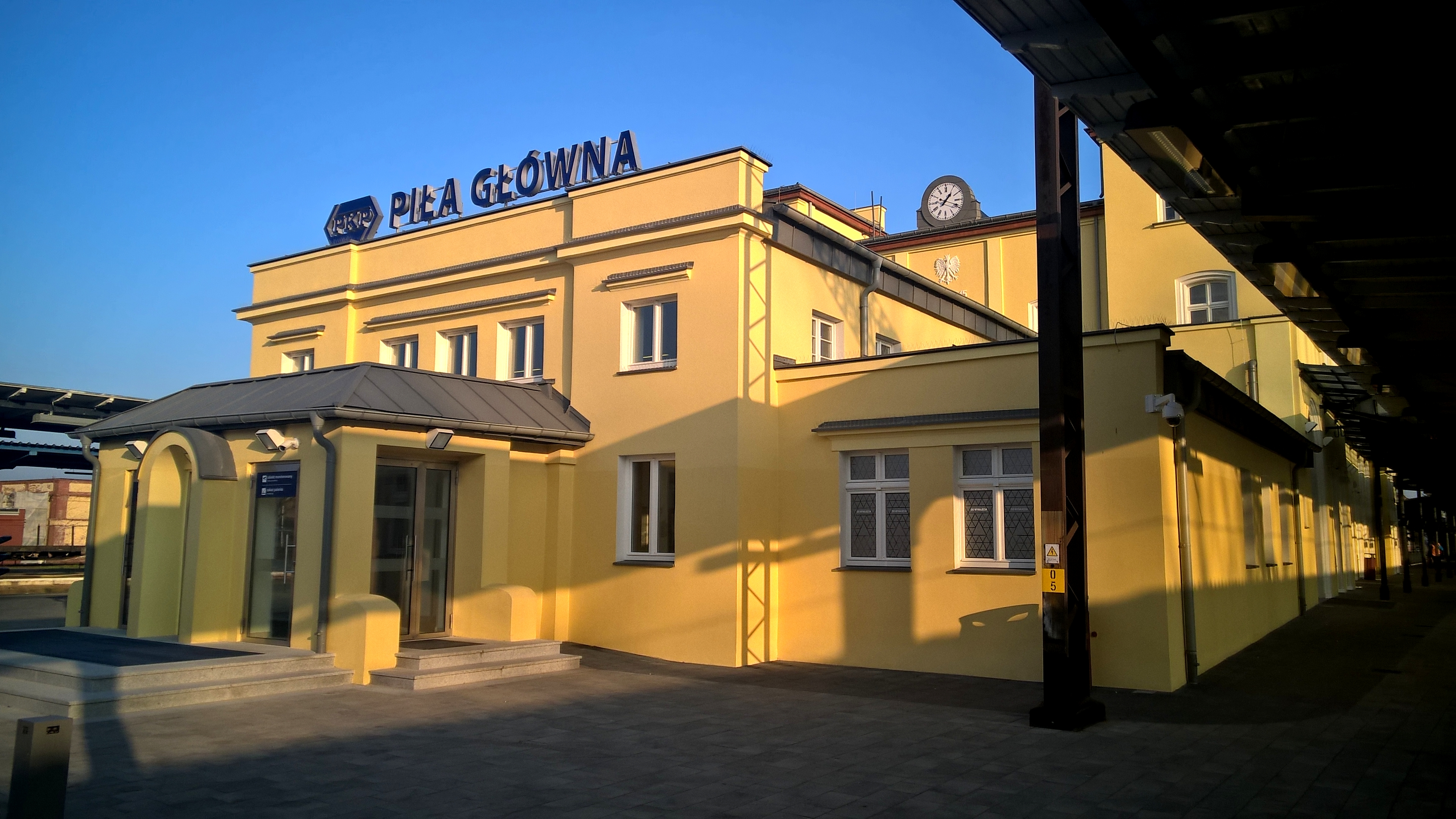 Budynek dworcowy od strony zachodniej.